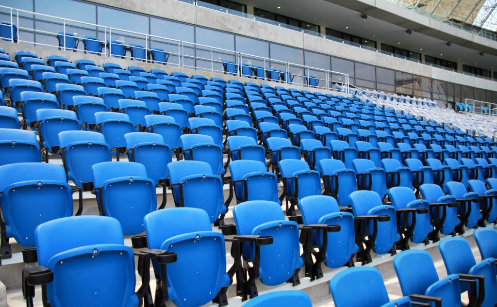 Detalhe dos assentos da Arena das Dunas, em Natal, Brasil.